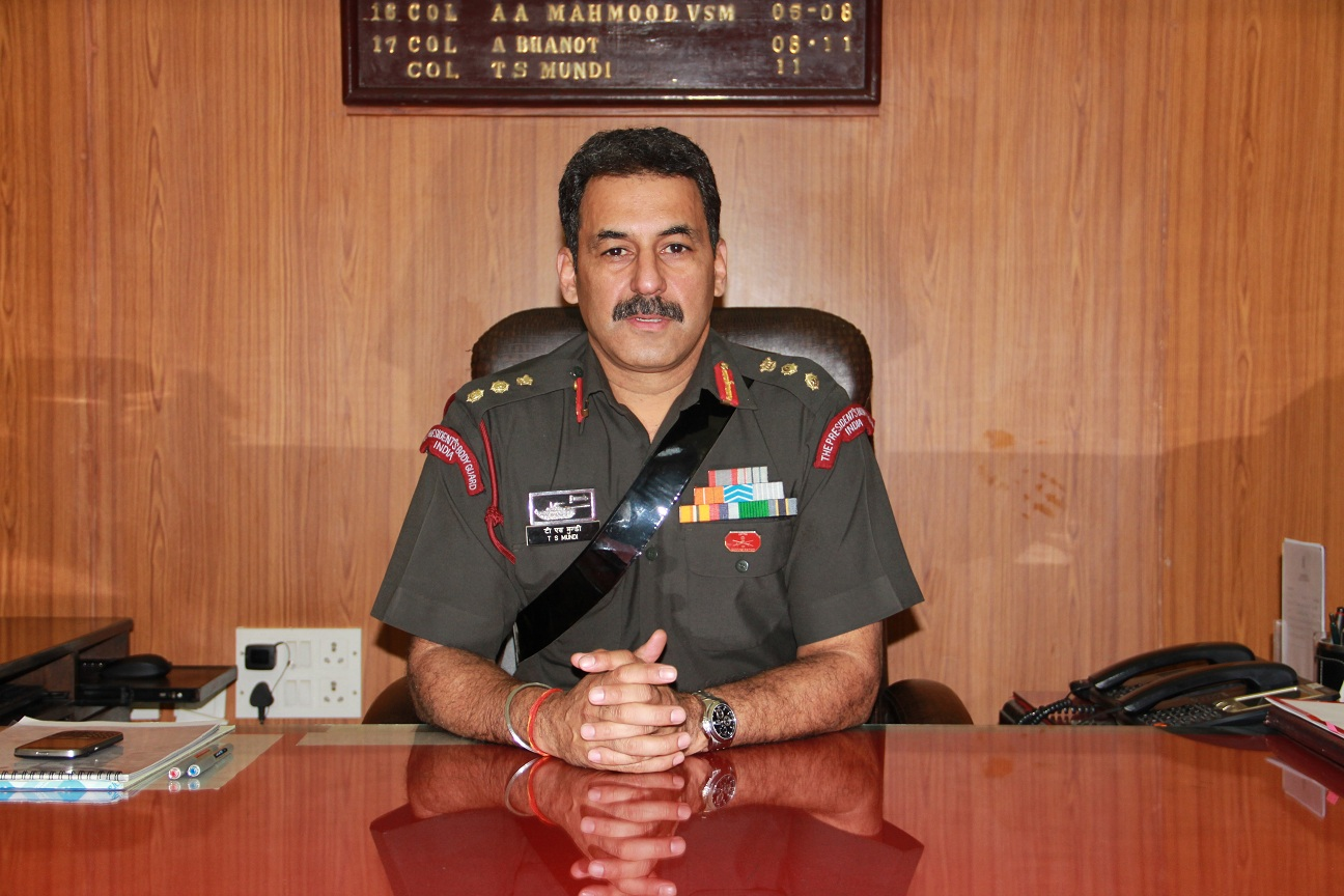 Colonel T. S. Mundi